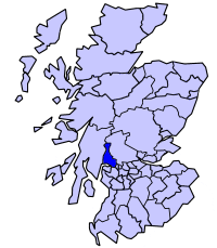 Dumbarton District